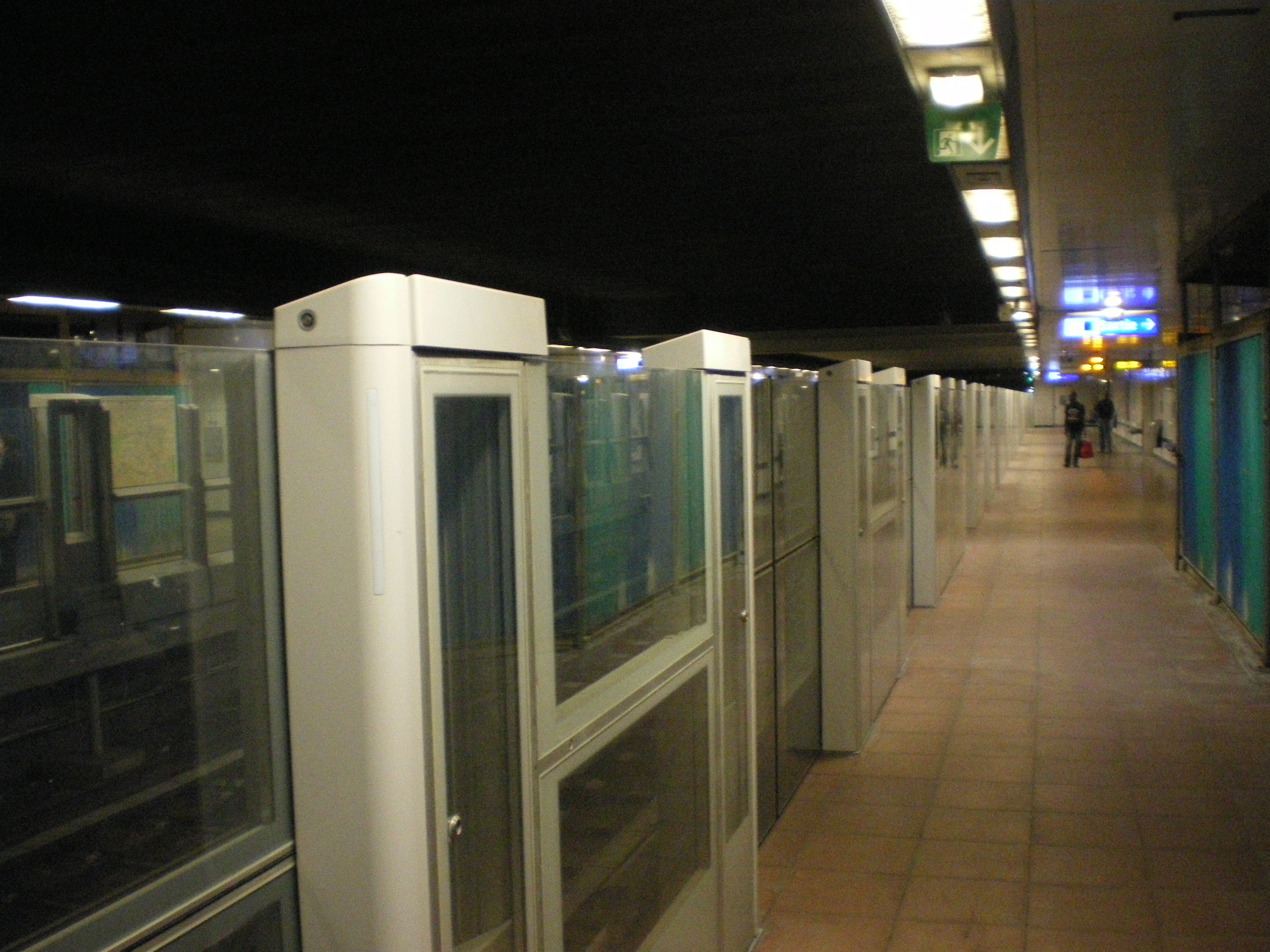 Metro Saint-Denis Porte de Paris